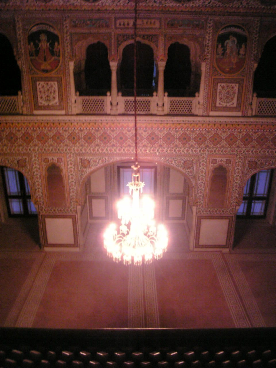 Inside Samode Havali